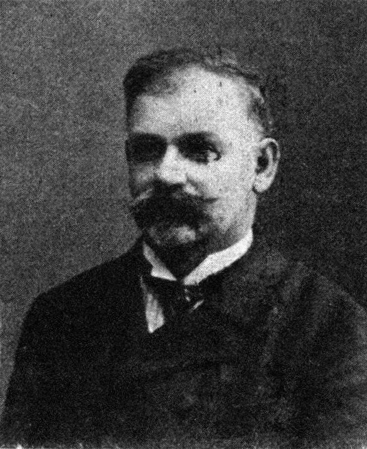 Österreichischer Politiker, Reichsratswahl 1907, Name siehe Dateiname